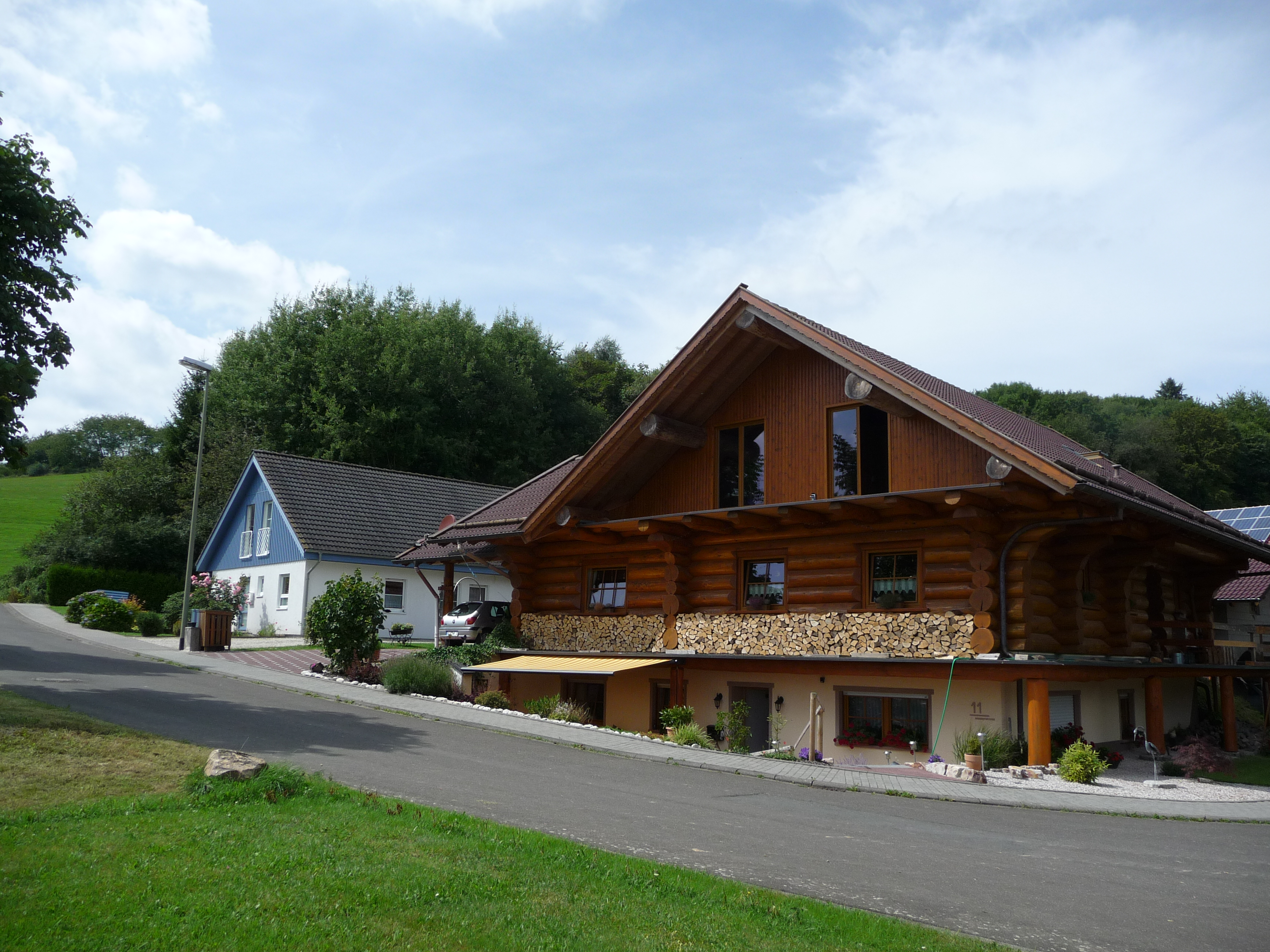 Abentheuer – Schulweg Waldstraße